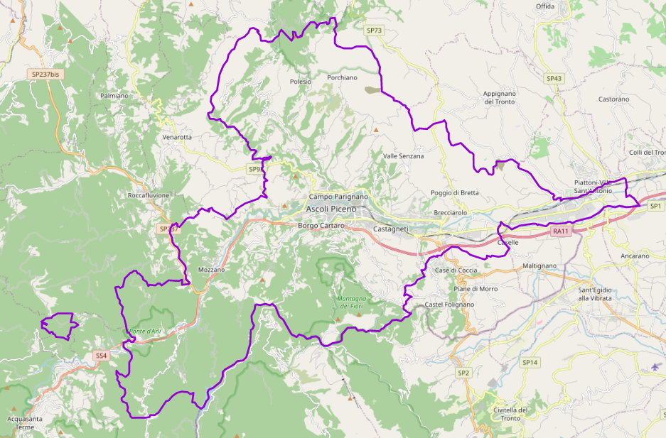 carte réalisée sur umap This map may be incomplete, and may contain errors. Don't rely solely on it for navigation.